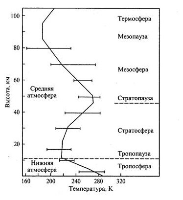 График зависимости температуры от высоты в разных слоях атмосферы.